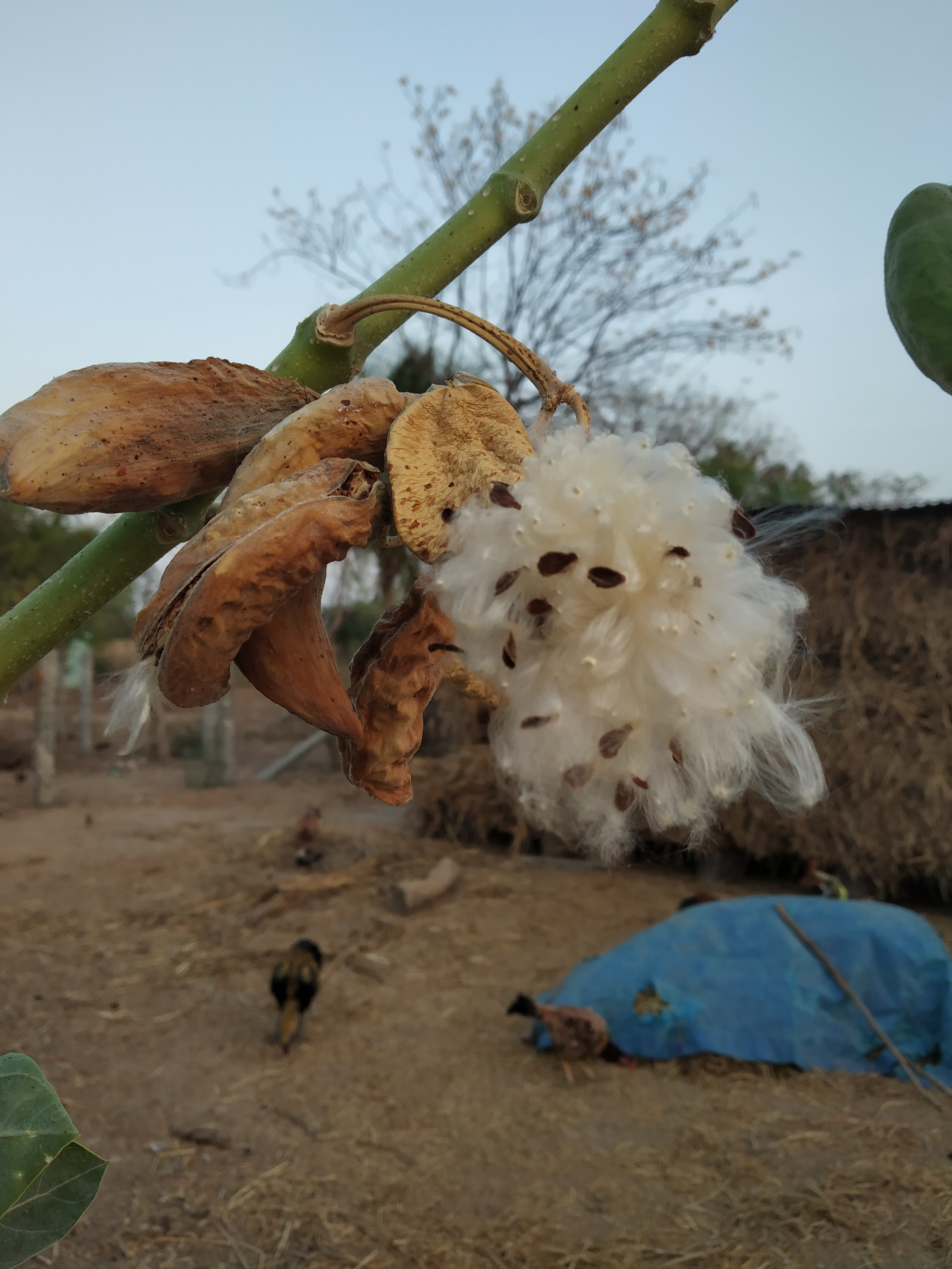 White Calotropis gigantea seeds